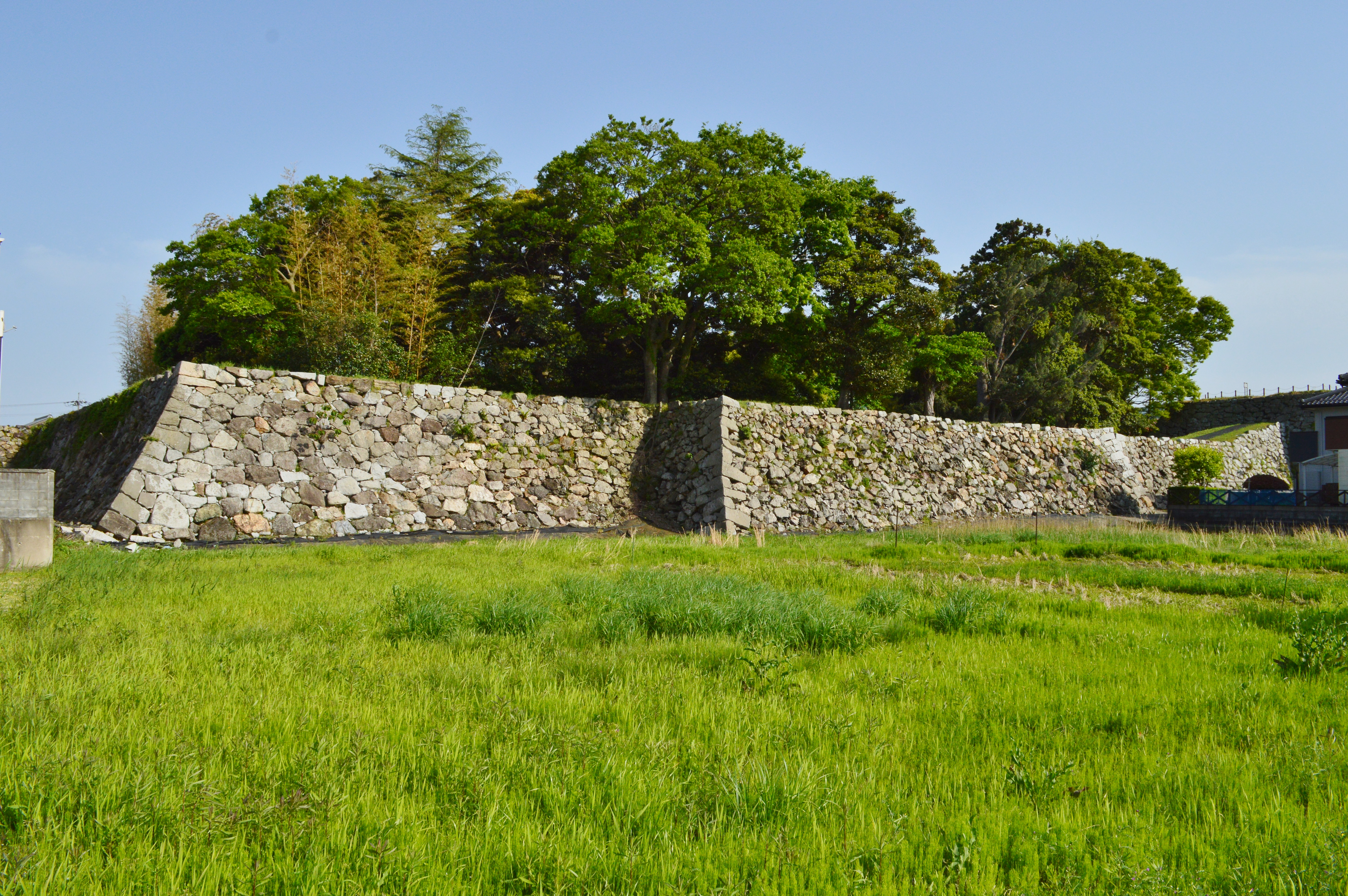 小浜城 (若狭国) 本丸石垣